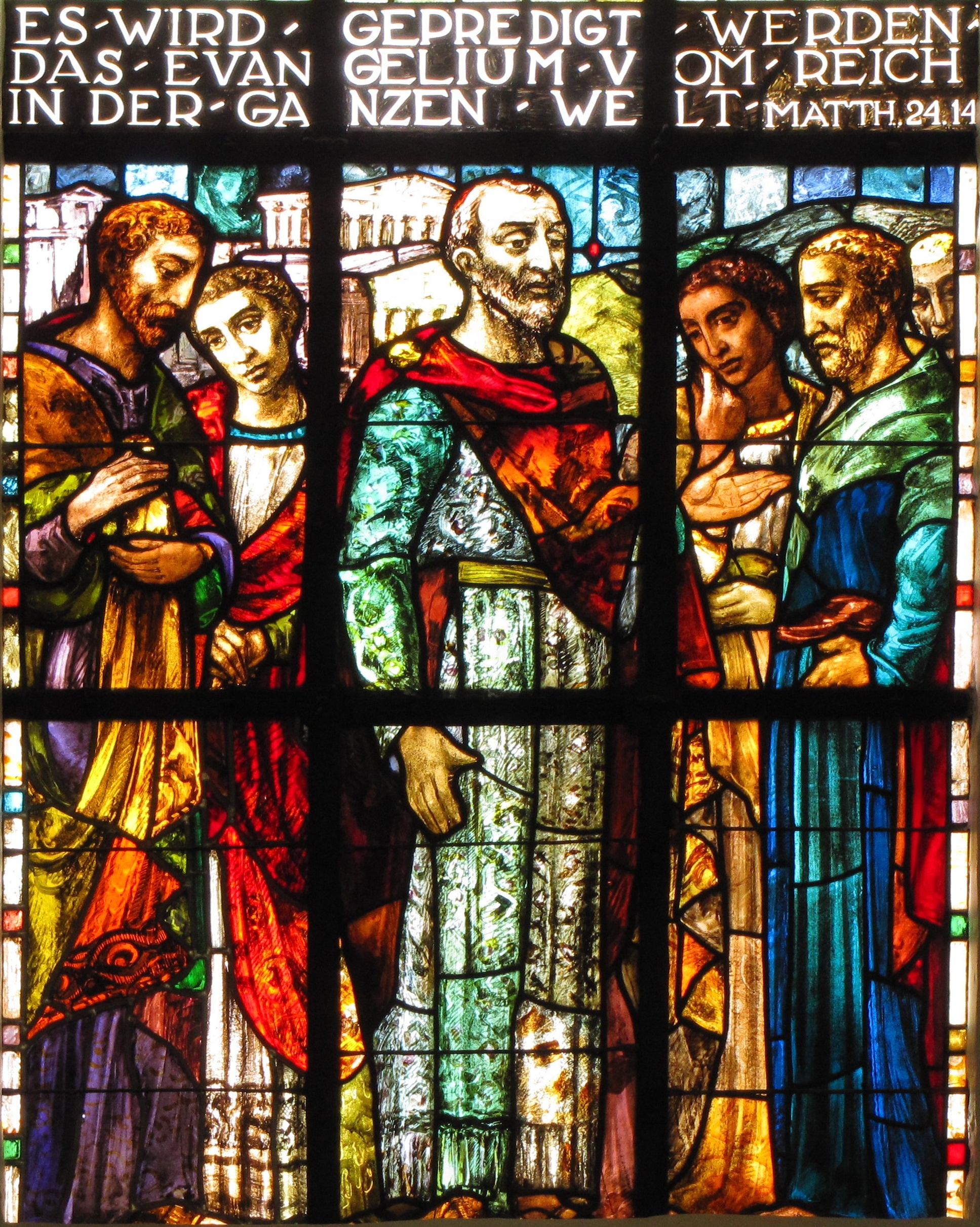 Alsace, Bas-Rhin, Église protestante de Notre Seigneur Jésus-Christ de Bischheim (PA00084621). Verrière "Prédication de St Paul" (Joseph Ehrismann 1880-1937).